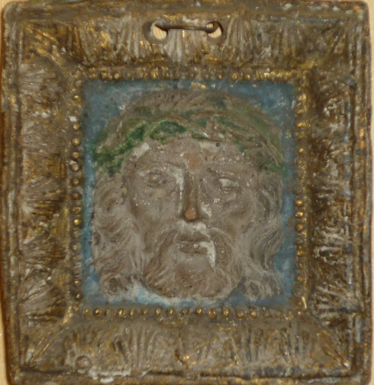 Representation de la Sainte Face du Christ ou du "Hagion Keramion", morceau de céramique (7,3 x 6,9 cm) (objet pieux, peut-être XIXe siècle ?)